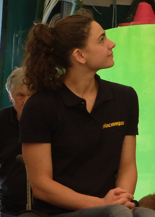 Giulia Ghiretti al Giocampus Italian swimmer Giulia Ghiretti at Giocampus, June 2016